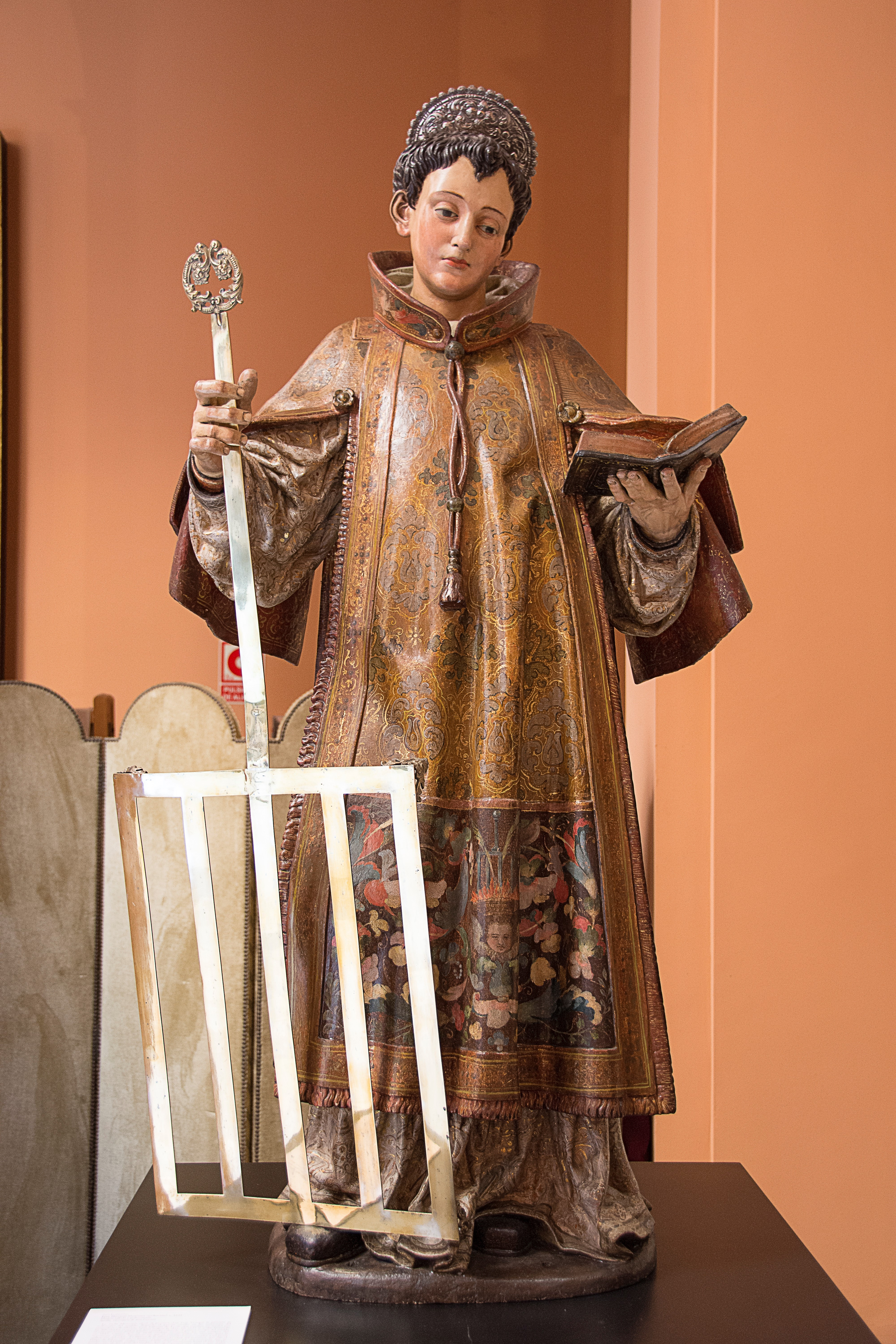 Talla de San Lorenzo. Atribuida por el profesor Hernández Díaz a Juan Martínez Montañés. Se encuentra en un retablo lateral junto a la capilla del cristo de las Fatigas, en la iglesia de San Lorenzo de Sevilla.